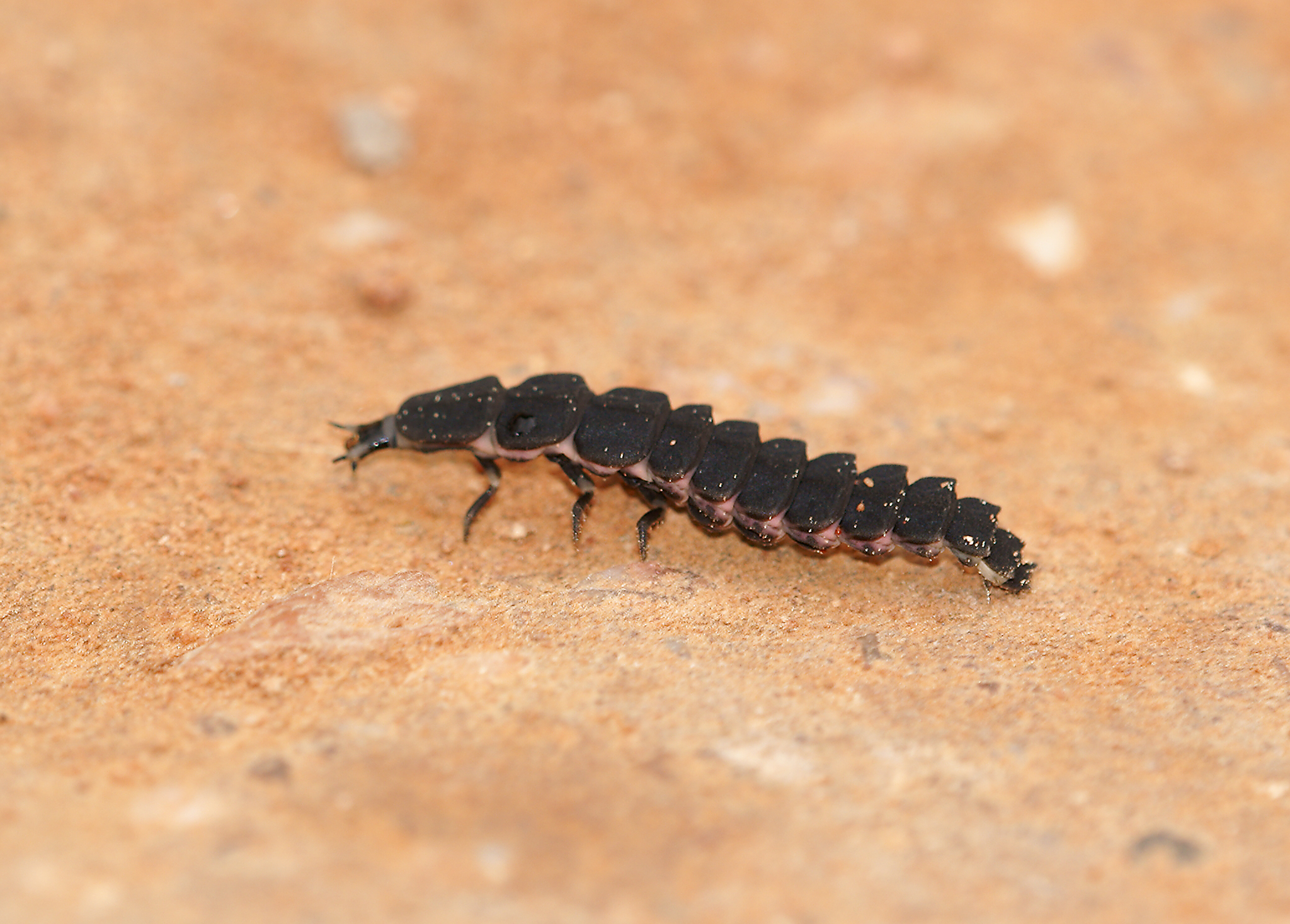 Nyctophila reichii larva